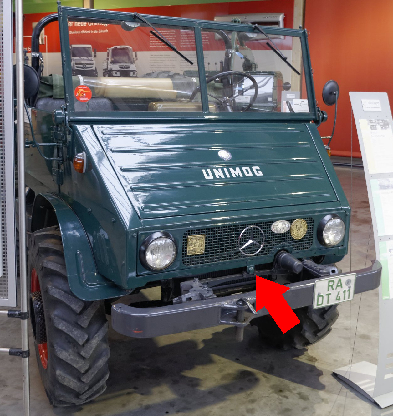 Dreipunktaufhängung des Fahrerhauses beim Unimog 411